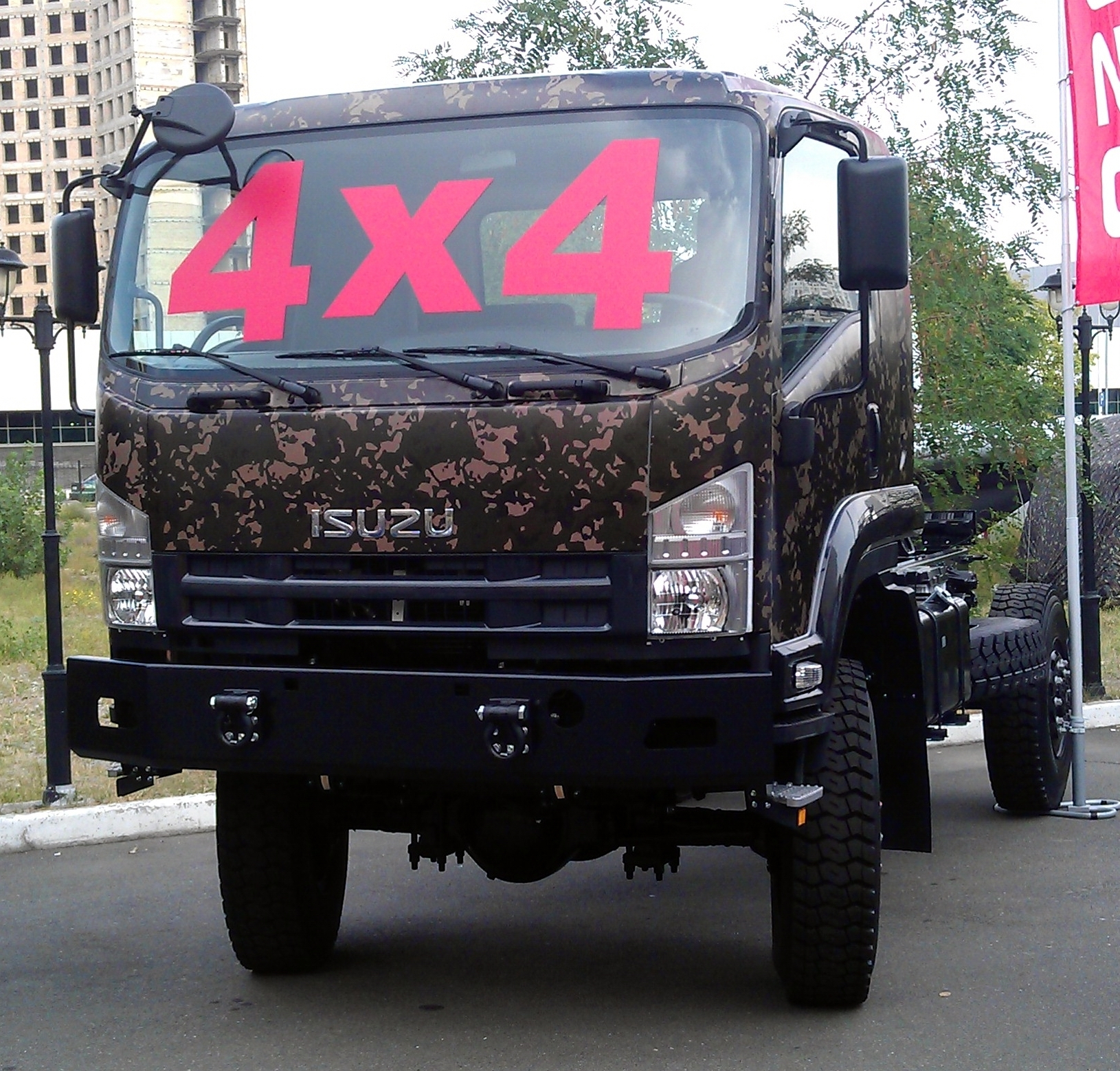 Полноприводное шасси ISUZU FTS 34 SL-KDN на выставке "Зброя та безпека". Киев, сентябрь 2015 г.